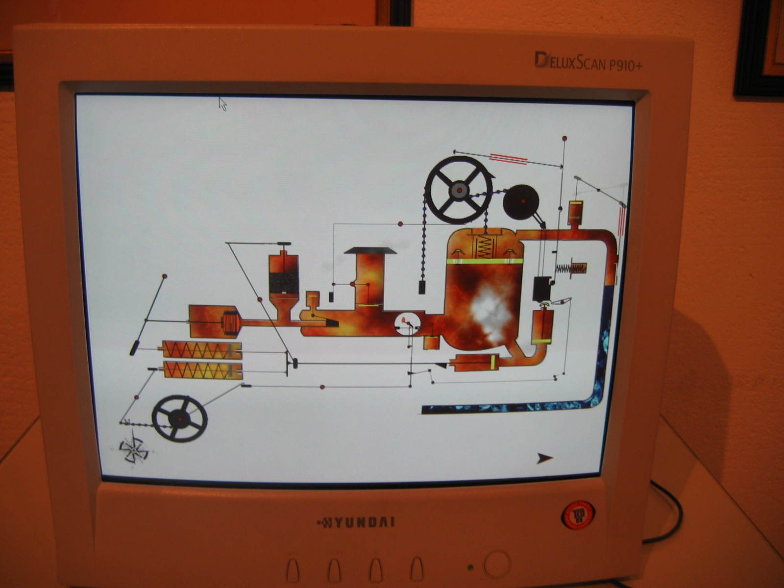 skemo pri la eksplodmotoro Pireoloforo de Joseph Nicéphore Niépce